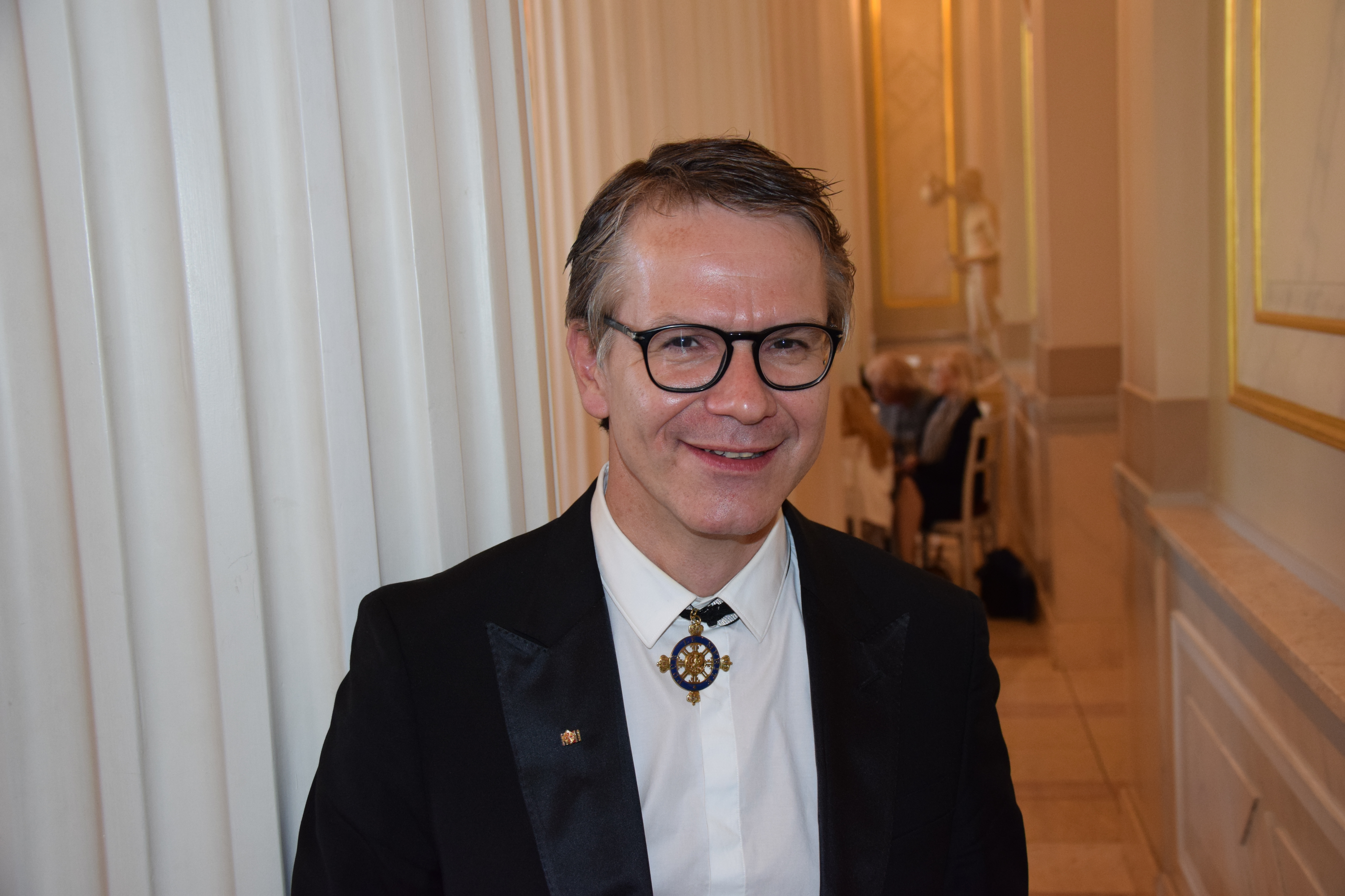 Öffentliche Sitzung der Mitglieder des Ordens Pour le mérite für Wissenschaften und Künste 2014 im Konzerthaus am Gendarmenmarkt in Berlin